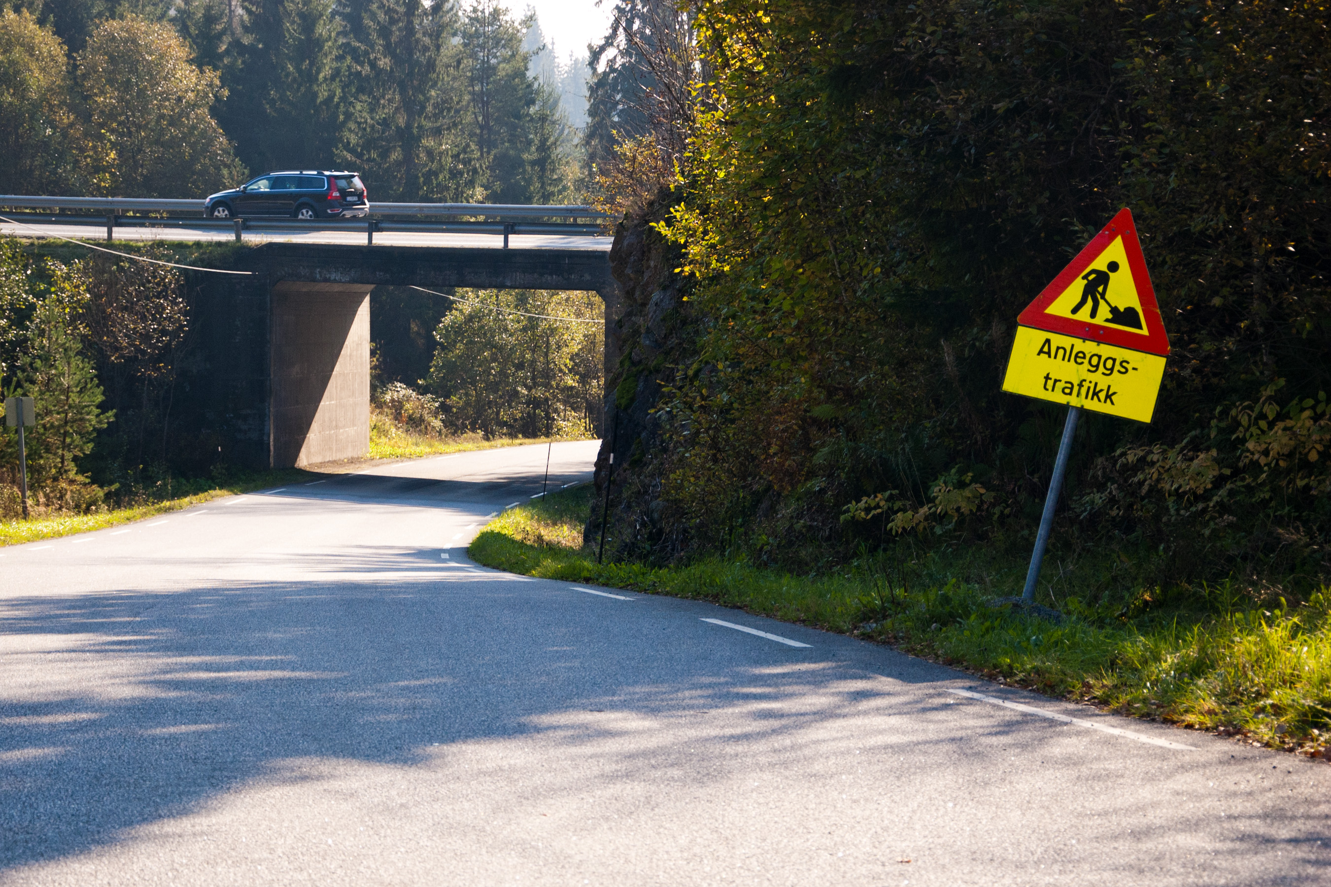 Fylkesvei 60 Mørjevegen I Porsgrunn, Telemark. Over brua går Europavei 18.